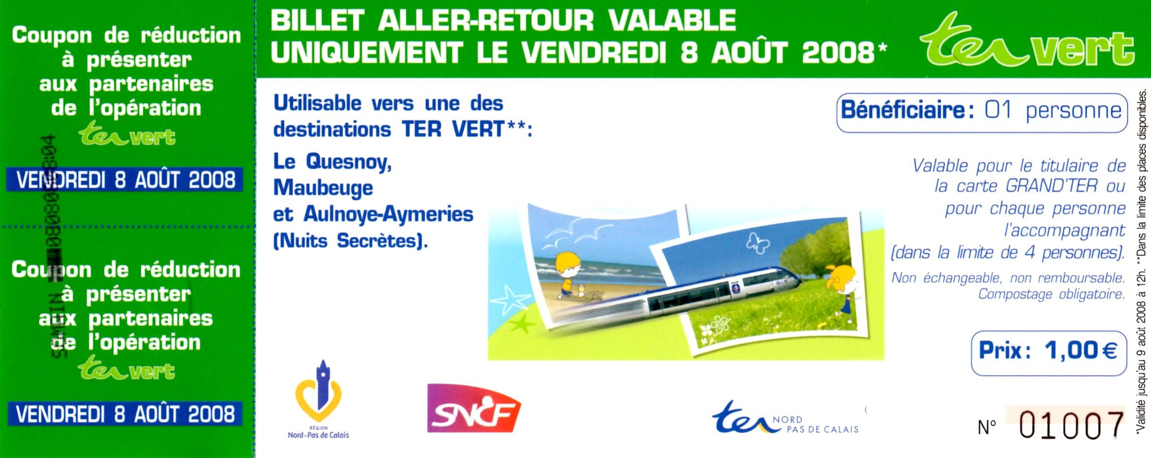 Ticket de train du Nord-Pas-de-Calais : opération TER Vert, le vendredi 8 août 2008.